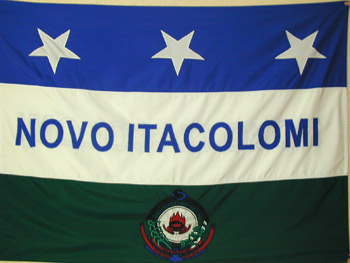 Bandeira de Novo Itacolomi